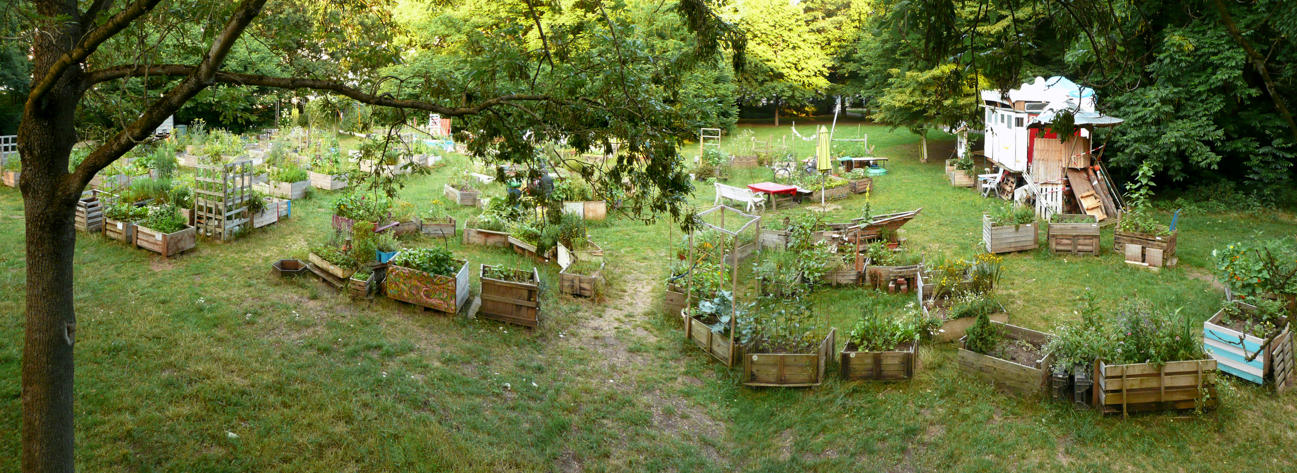 Pagalino Gemeinschaftsgarten mit Hochbeeten in Hannover